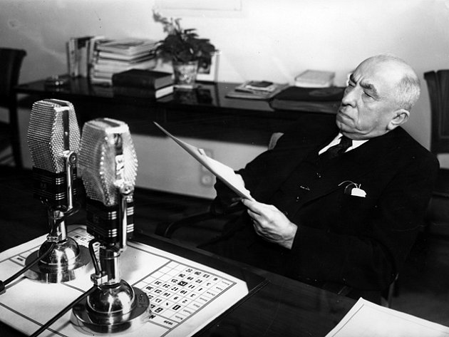 Prezident Emil Hácha při vánočním projevu do rozhlasu 22. prosince 1938